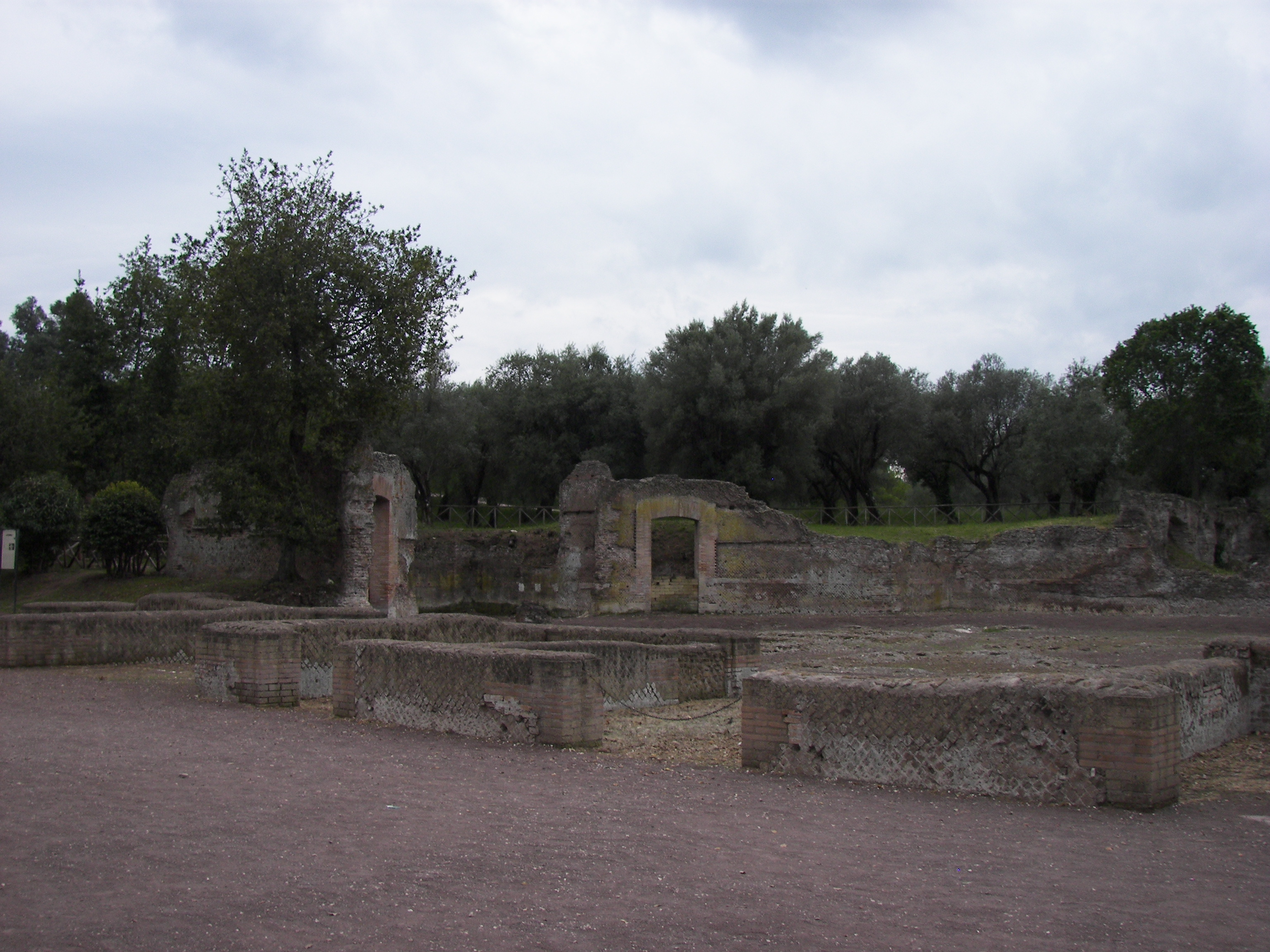 Vestibolo area of Villa Adriana, Tivoli.